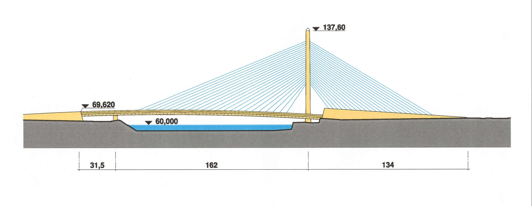 Vue en élévation du pont du pays de Liège sur la Meuse, avec la passe sur la Meuse et la culée contrepoids